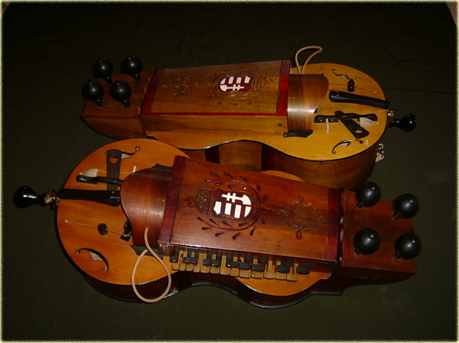 Image of tekerőlant (Hungarian hurdy-gurdy) made by Hungarian hurdy-gurdy maker.